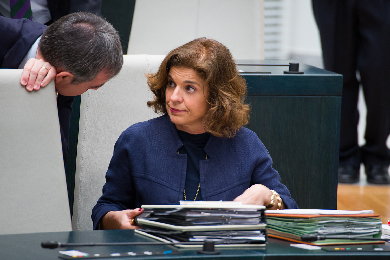 Ana Botella